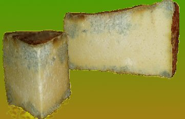 bleu de Termigon